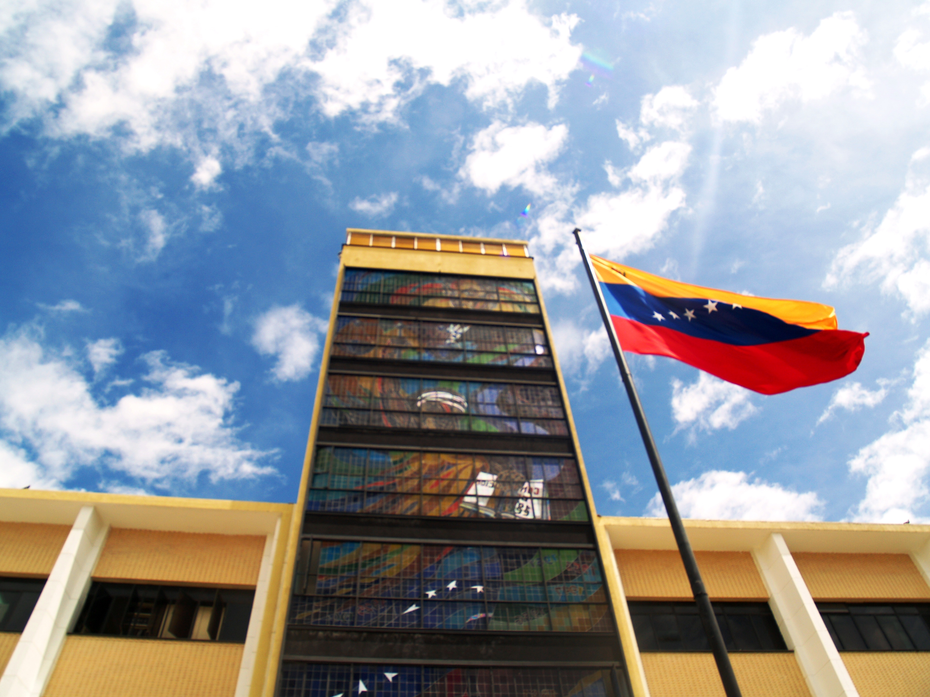 Conociendo el centro de Barquisimeto encontré esto, el Edificio Nacional, sede del tribunal de Justicia de la ciudad, vaya joya de la arquitectura del siglo pasado. De frente, acceso frontal con el pabellon nacional. Se denota el gran vitral, uno de los más grandes de Venezuela.